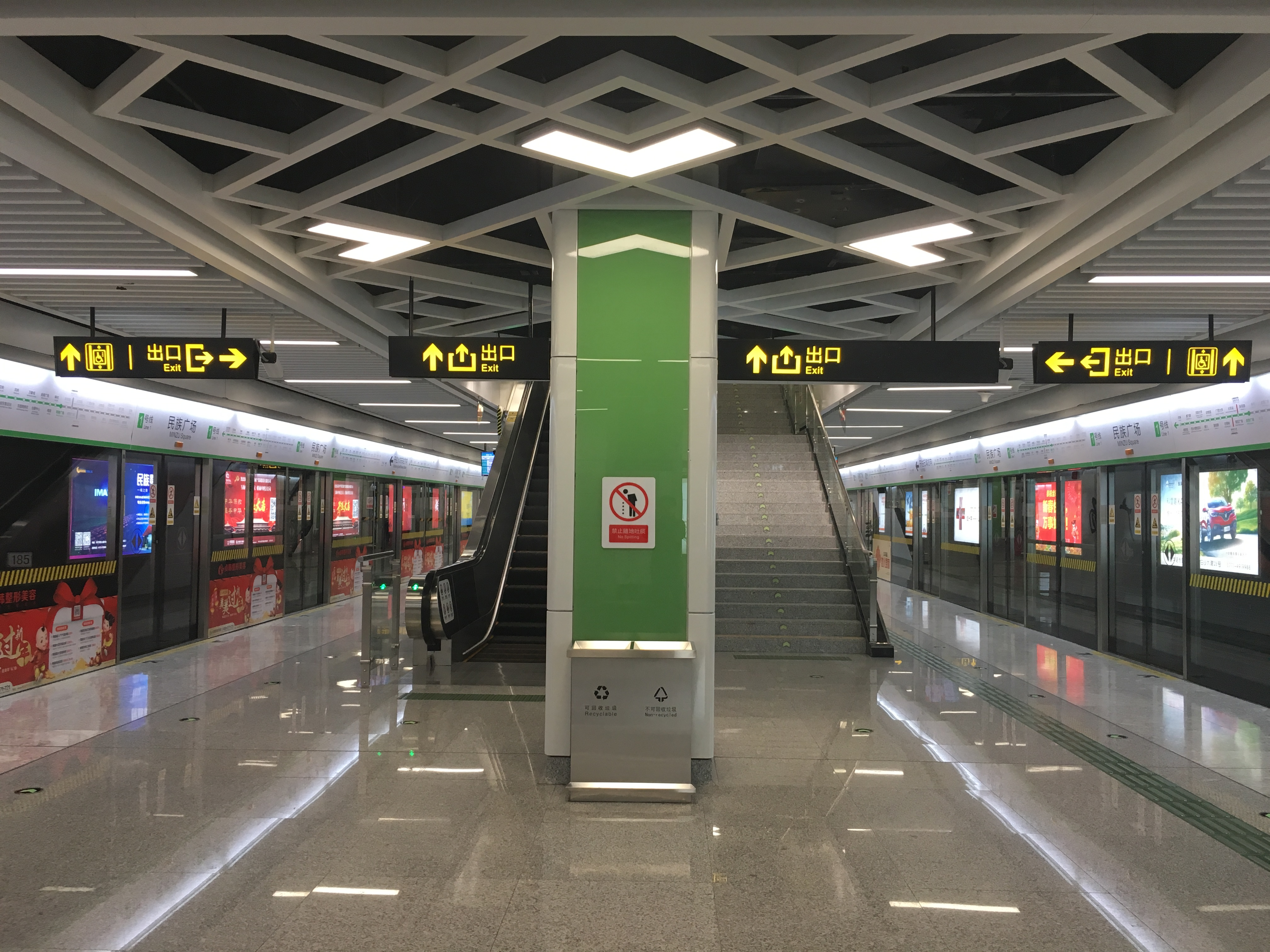 中文（中国大陆）: 南宁轨道交通